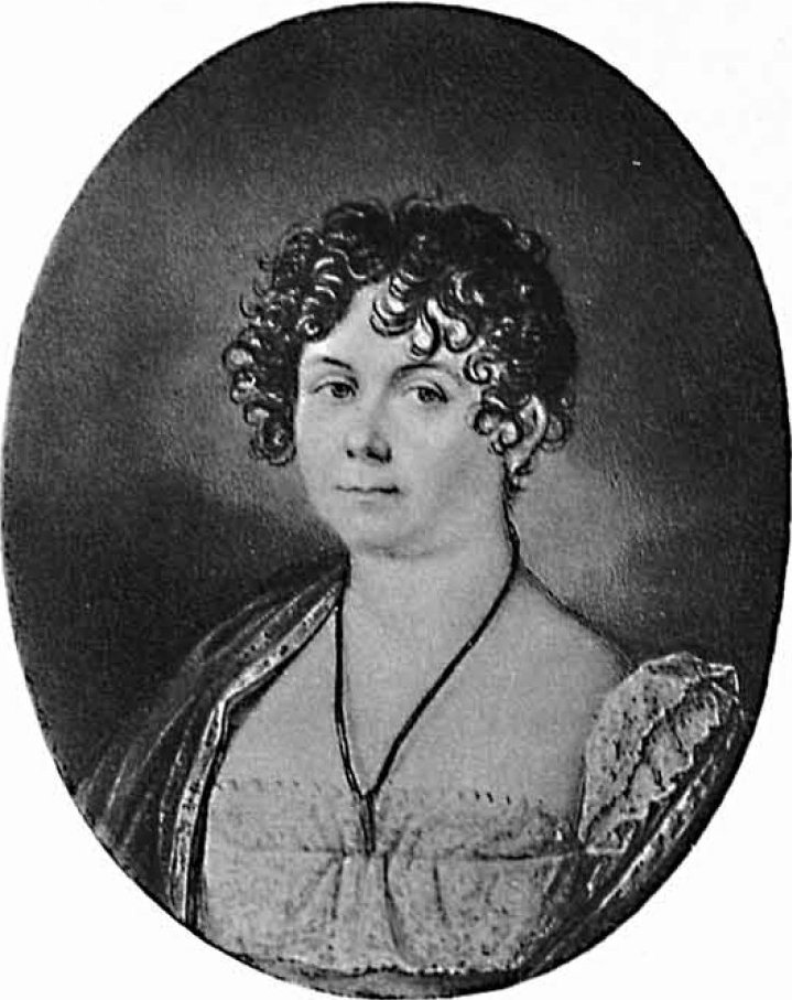 Графиня Анна Владимировна Бобринская (1769–1846), супруга А.Г. Бобринского, урожденная баронесса Унгерн-Штернберг